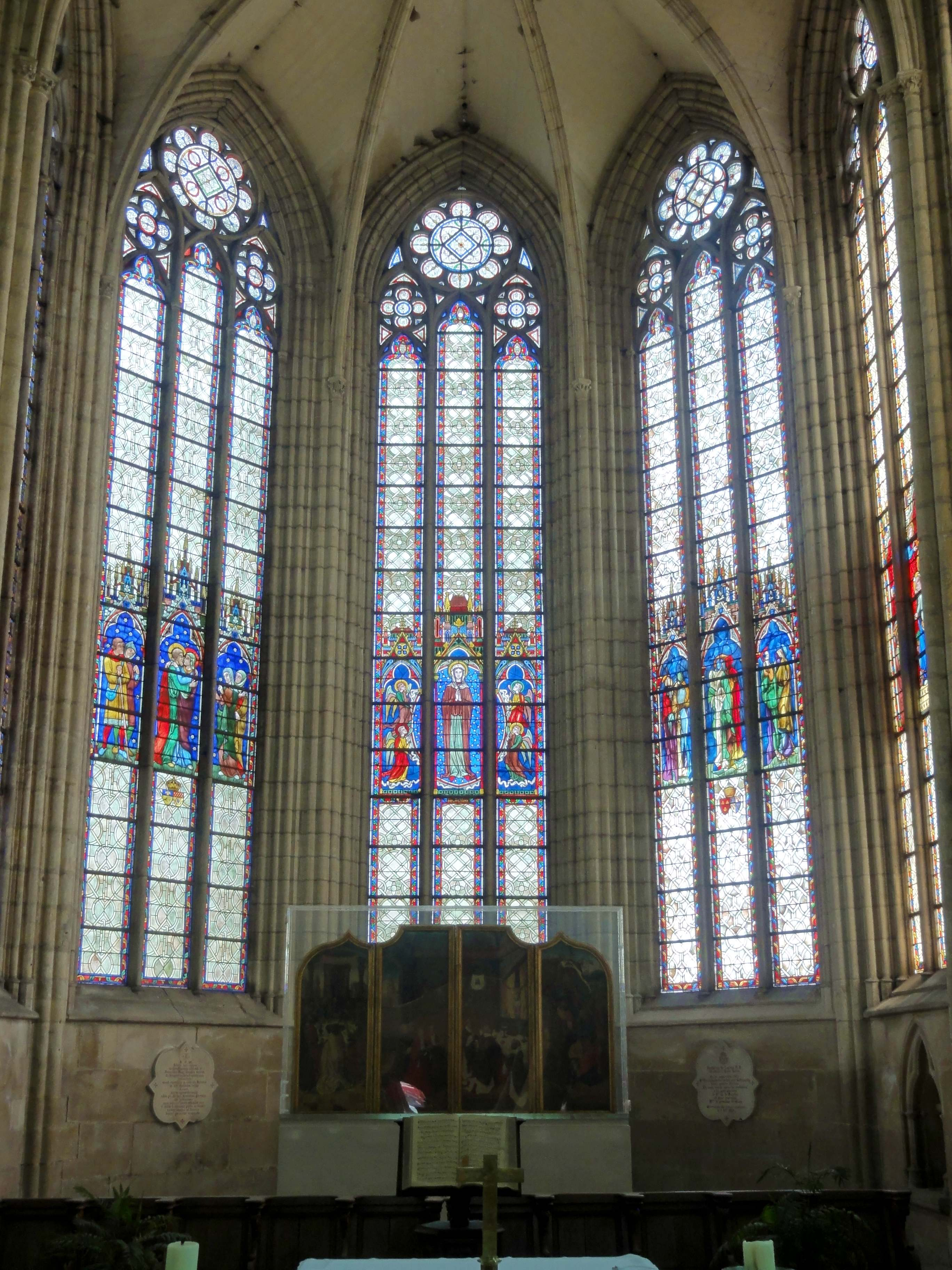 Abside.